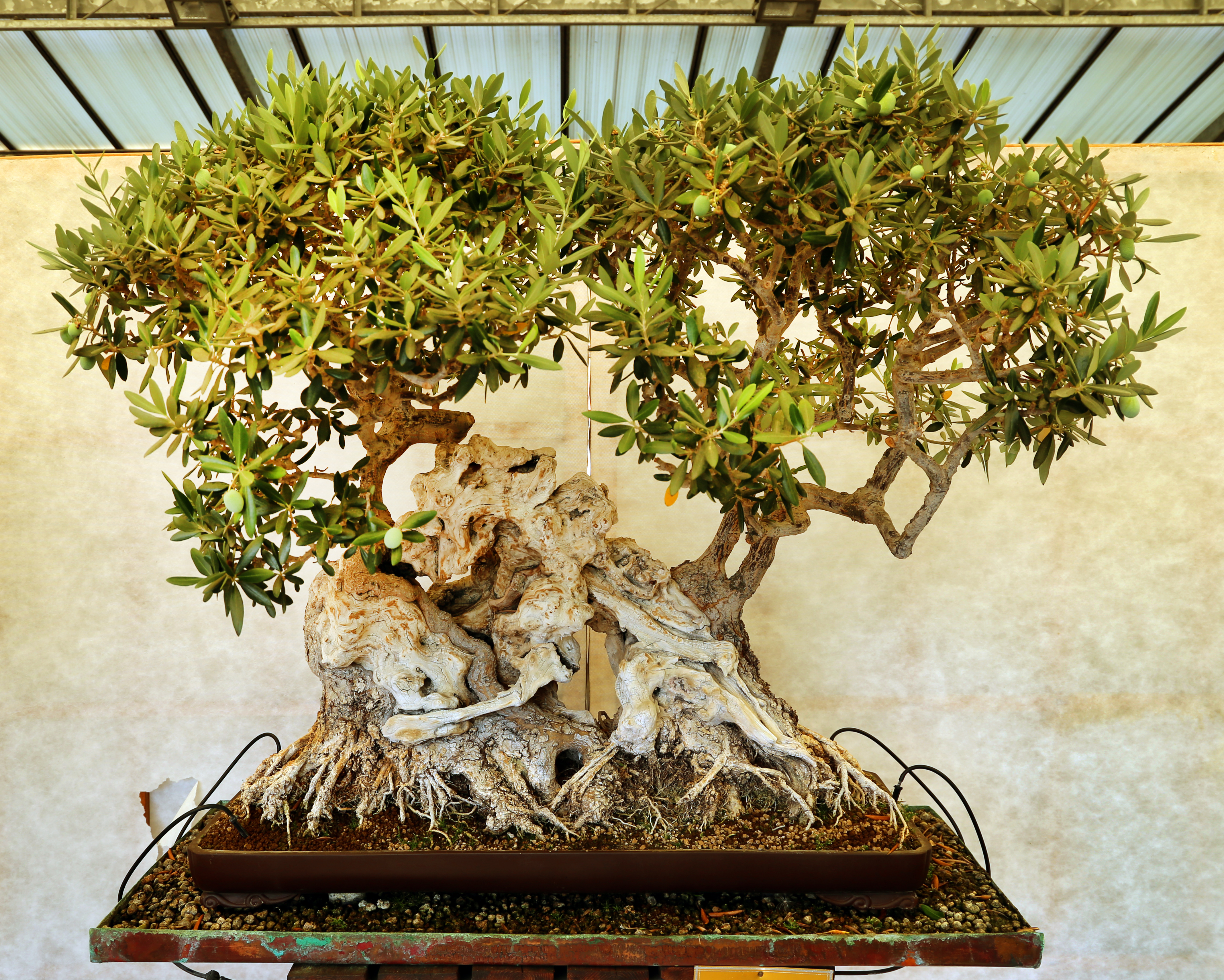 Museo del bonsai This is a photo of a monument which is part of cultural heritage of Italy.